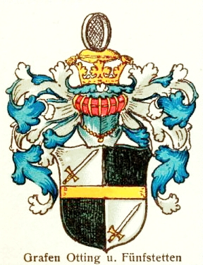 Wappen derer Grafen von Otting und Fünfstetten, seit 1817 bestehende Nebenlinie des Hauses Wittelsbach aus der Linie Pfalz-Birkenfeld.